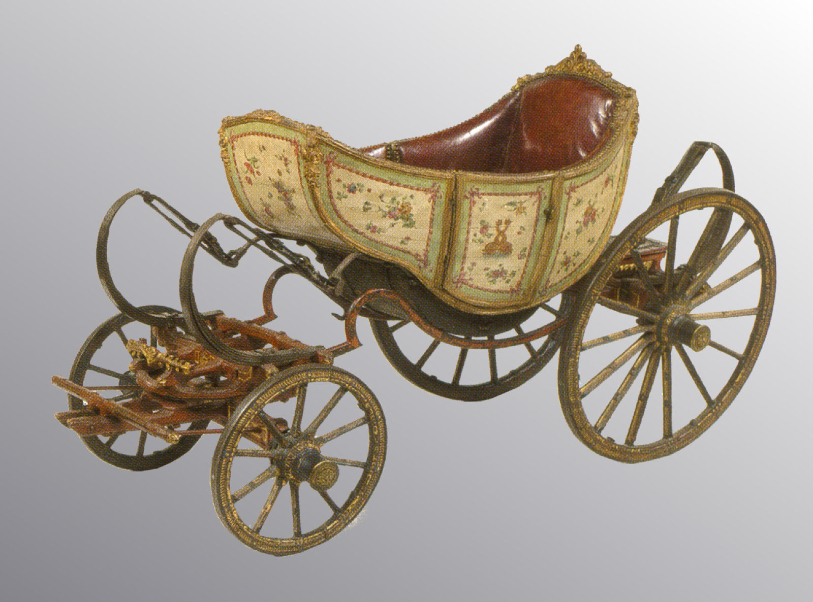 Petit Trianon - Voiture à chèvre du Dauphin